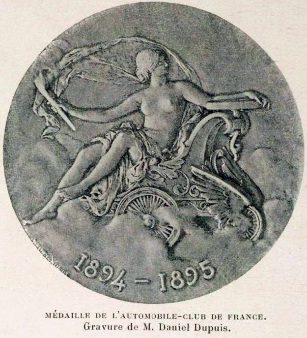 Médaille de l'Automobile Club de France, remise au vainqueur de Paris-Bordeaux-Paris 1895.